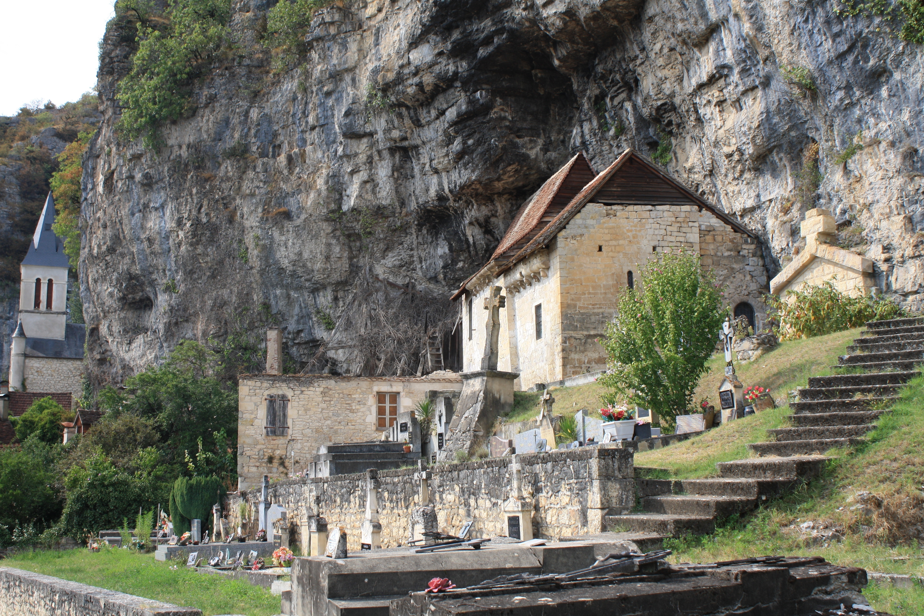 Maison, (Classé, 1938) .